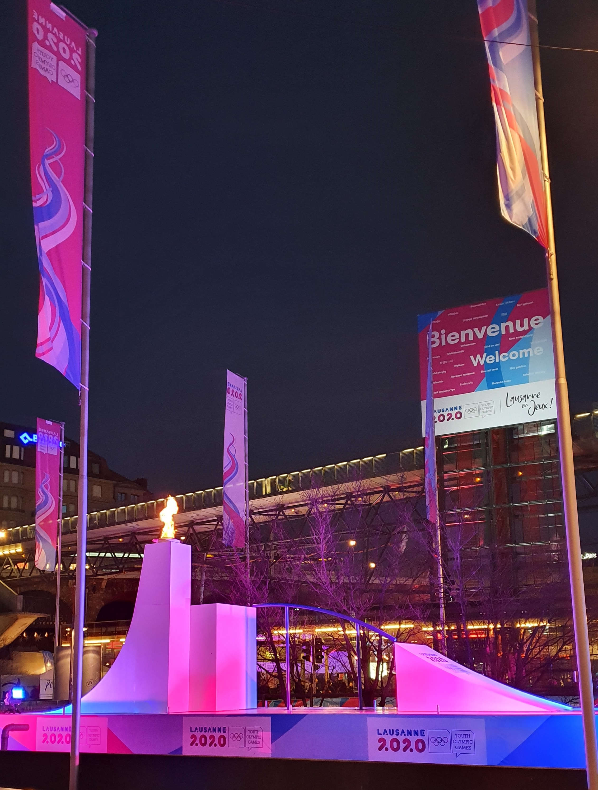 Flamme olympique à Lausanne, Place de l'Europe, pour les Jeux olympiques de la jeunesse d'hiver de 2020.